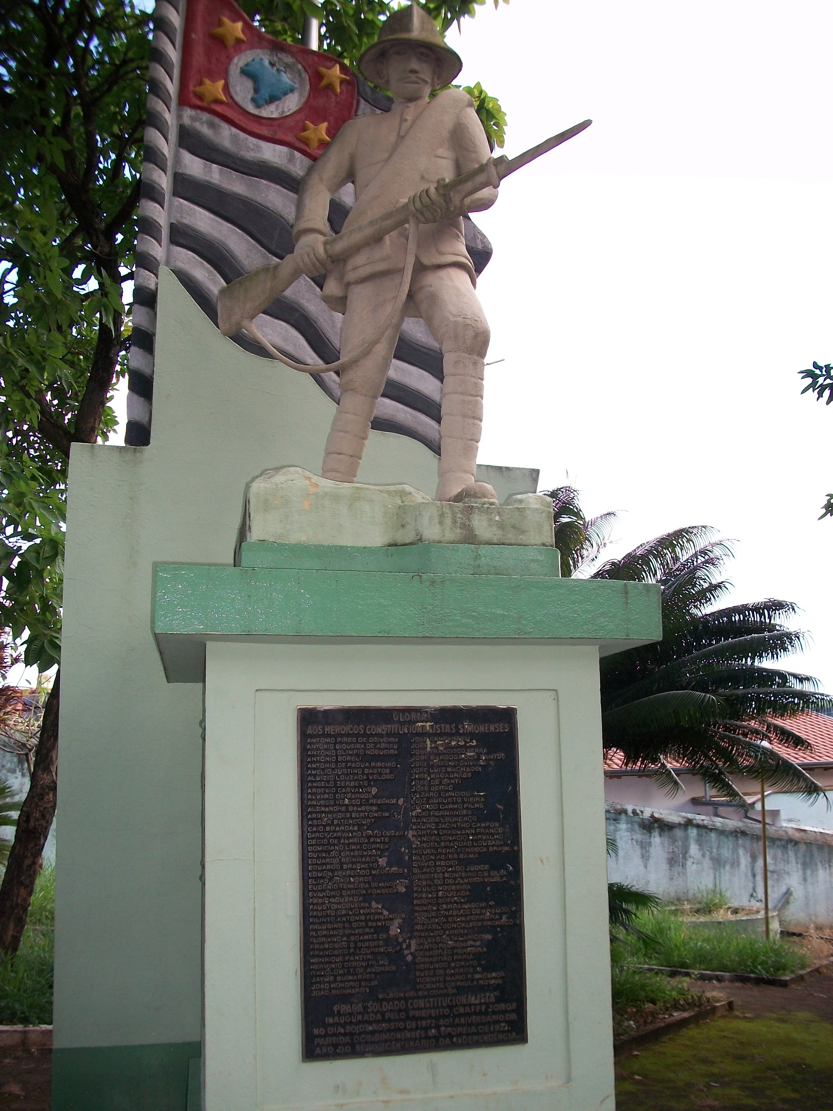 Praça do Soldado Constitucionalista (São Simão - SP), que recorda a Revolução de 1932. Homenageia os ex-combatentes da cidade de São Simão-SP.